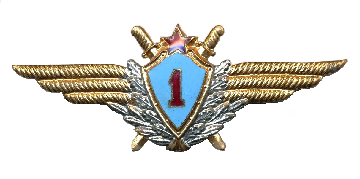 Нагрудный знак классной квалификации "Военный летчик 1-го класса"